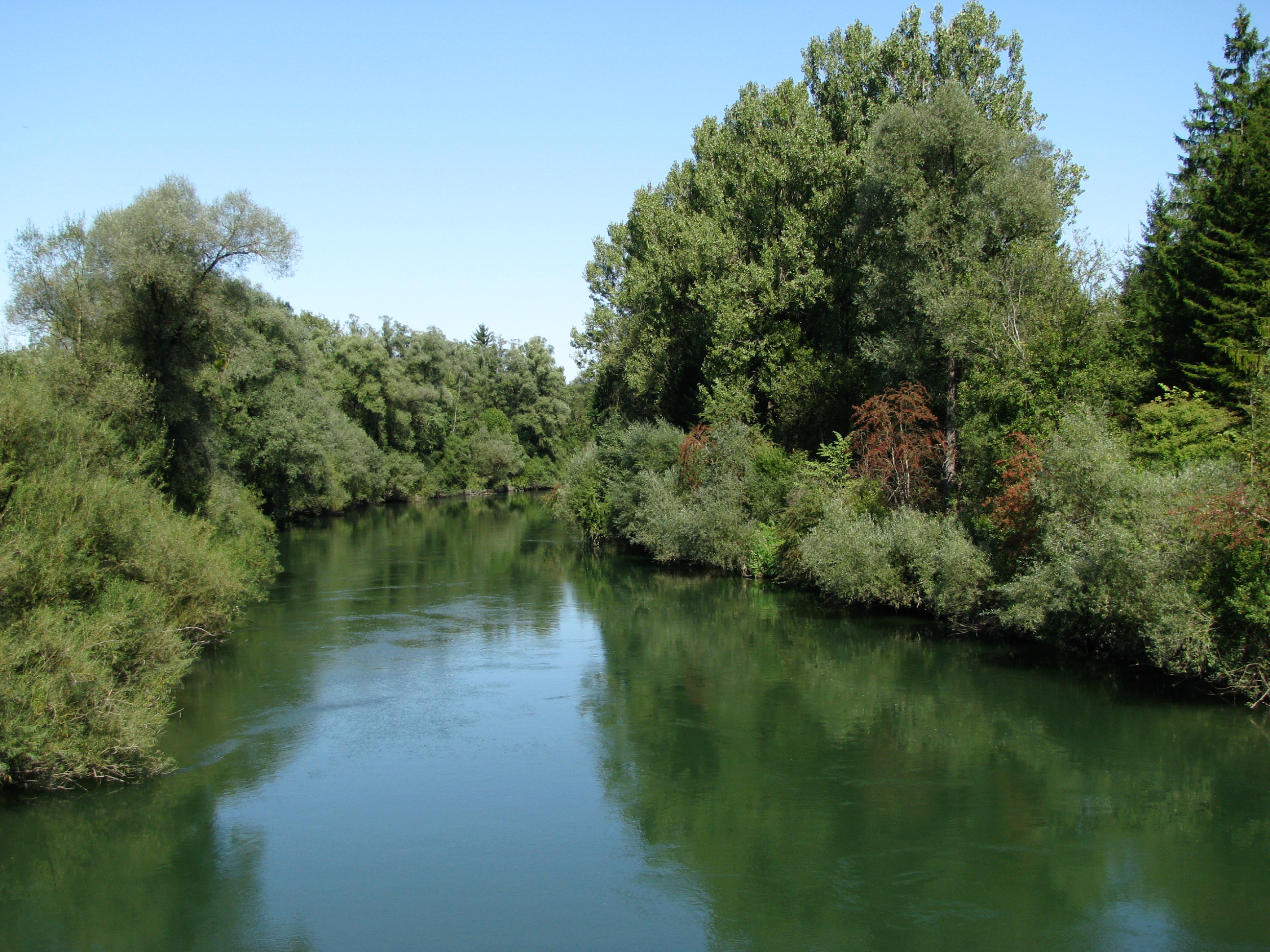 Loisach nördlich von Penzberg